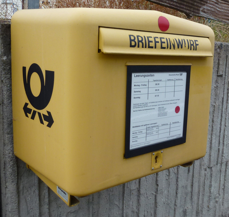 Postbriefkasten der Deutschen Post AG in Deutschland. Der Briefkasten stammt noch aus Bundespost-Zeiten, da das Posthorn mit stilisierten Blitzen (Pfeilen) ausgestattet ist. Auf der Einwurfklappe (Model: "Lidschlag" befindet sich die Beschriftung "Briefeinwurf". Der rote Punkt weist auf Sonntagsleerung hin.